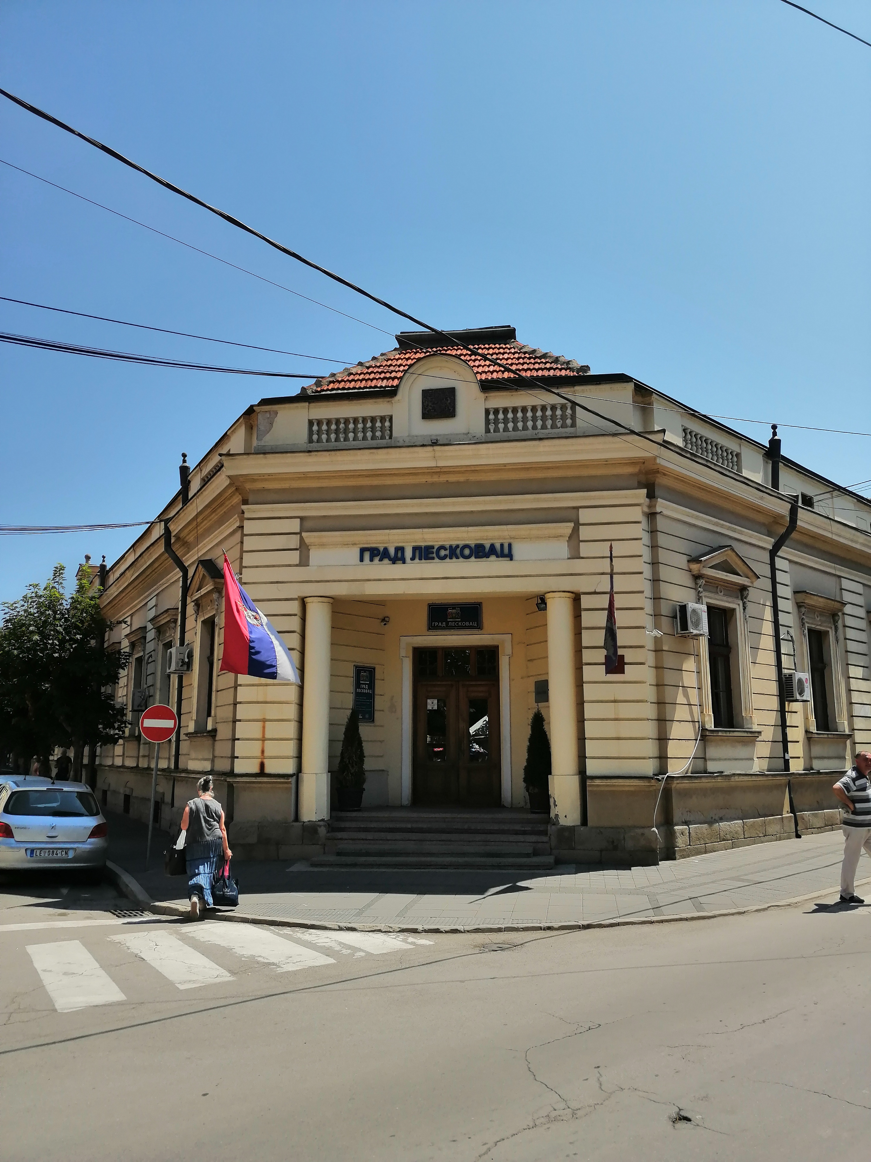 Zgrada Gradske uprave Leskovac